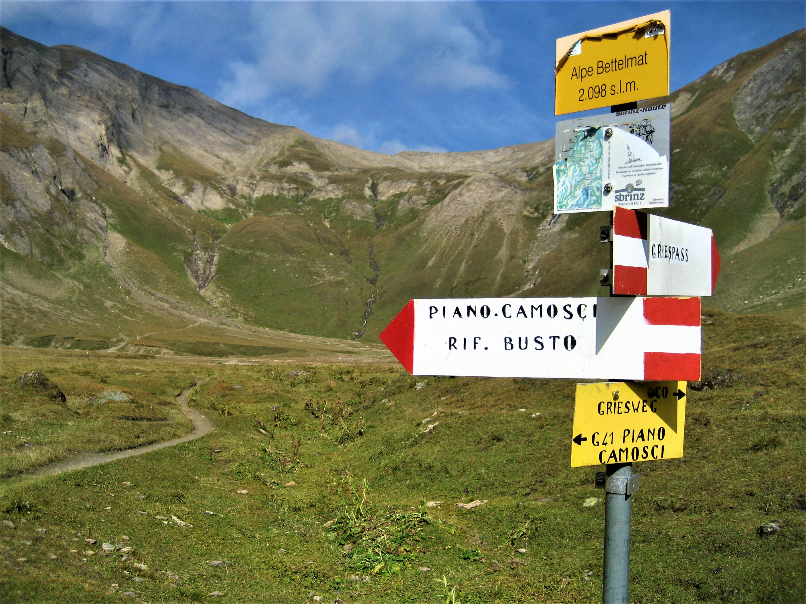 Berglandschaft